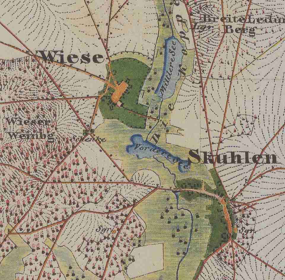 Schuhlen-Wiese, Ortsteil der Gemeinde Märkische Heide, Landkreis Dahme-Spreewald, Brandenburg, Deutschland, Ausschnitt aus dem Urmesstischblatt 3950 Groß Leuthen von 1846